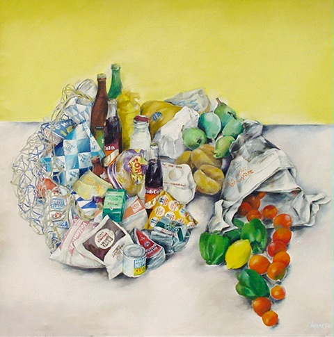 Peter Hoppe: "Einkaufsstilleben" (1970, Öl/Tempera auf Leinwand, 120 x 120cm)